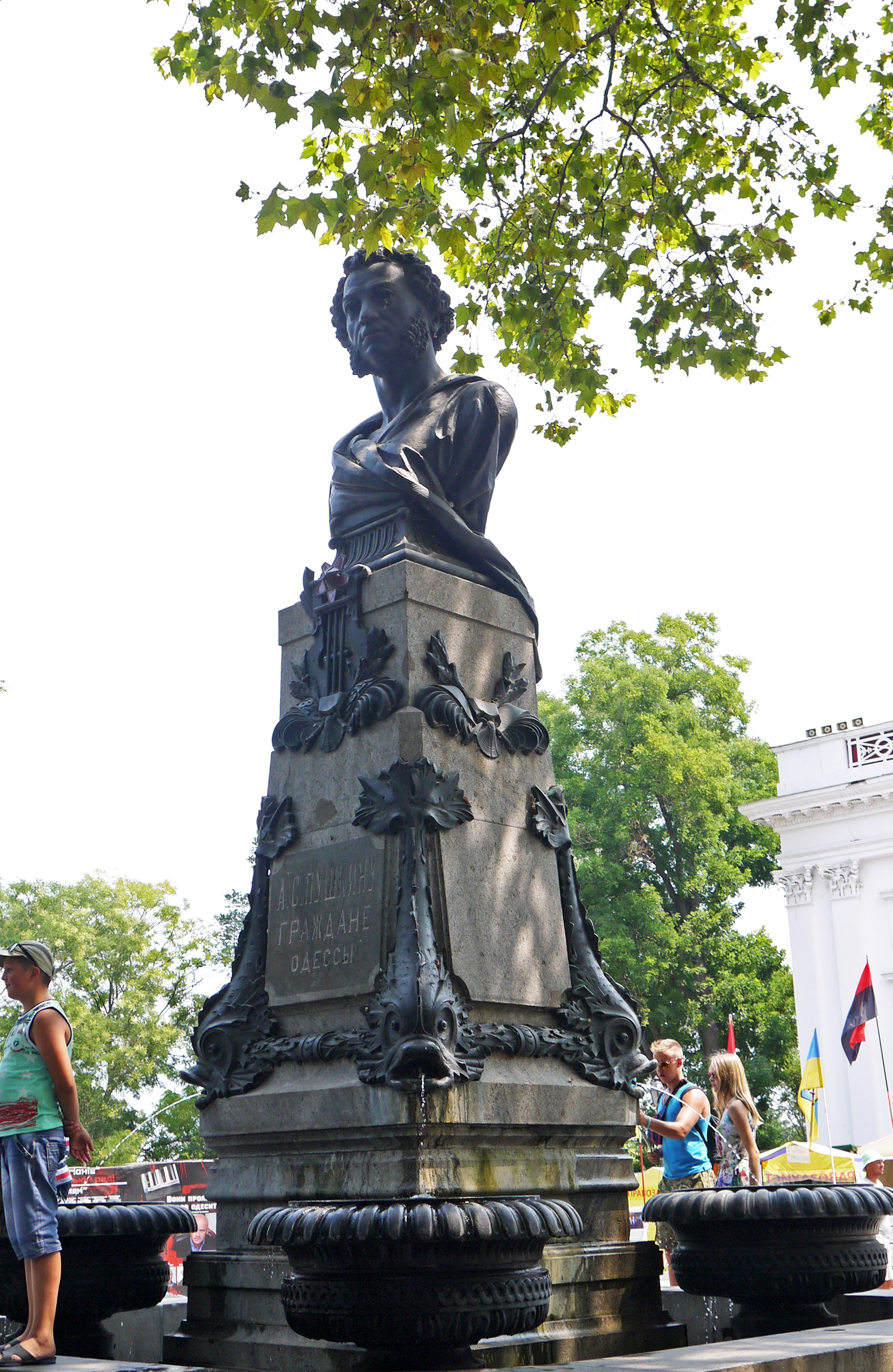 Пам'ятник поету О.С. Пушкіну, Одеса, Приморський бул.